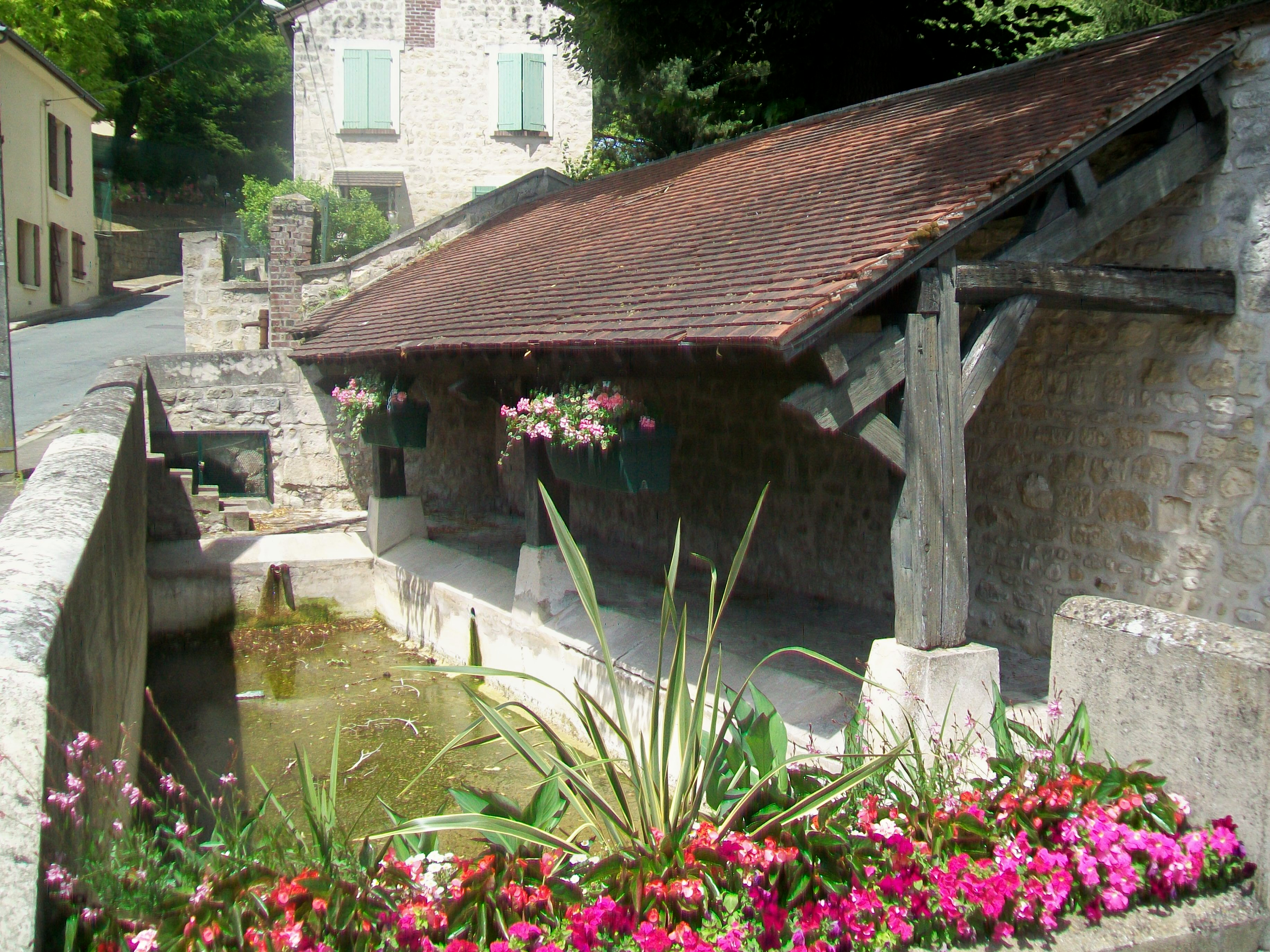 Le lavoir de la rue de Welwyn, près de l'entrée du parc municipal.